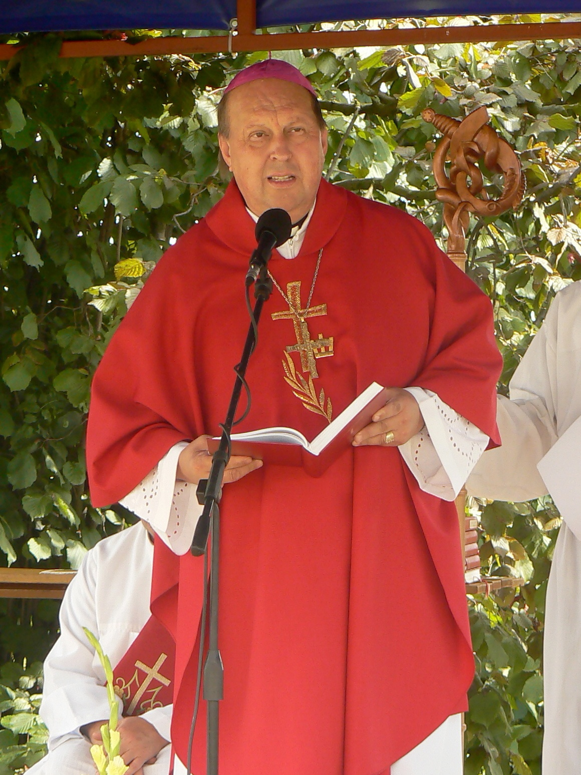 Mons. Pavel Posád na Zahradní slavnosti v Milonicích.